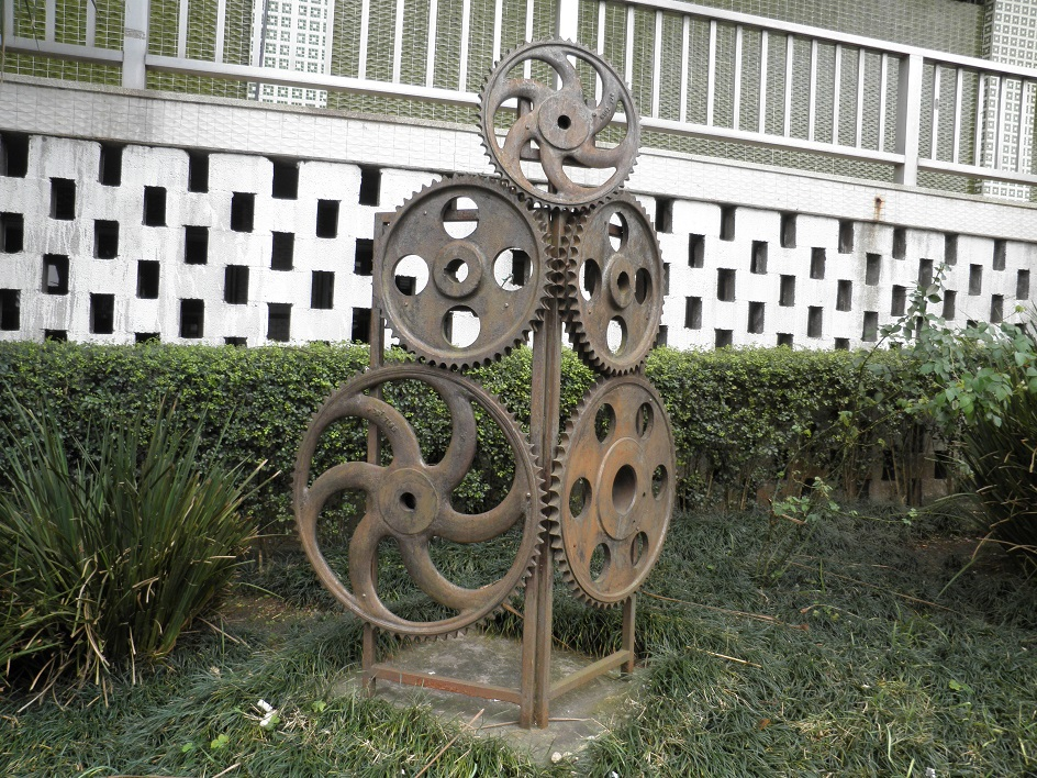 ABC地区金属労組歯車のモニュメント